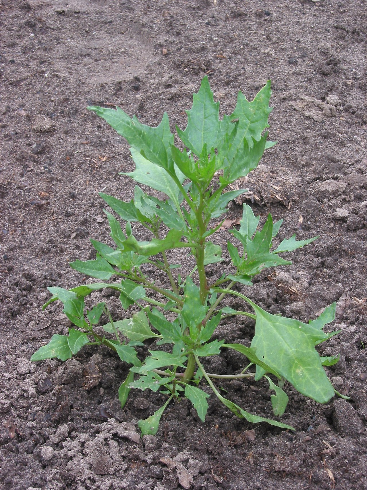 (nl. Rode ganzevoet) Chenopodium rubrum